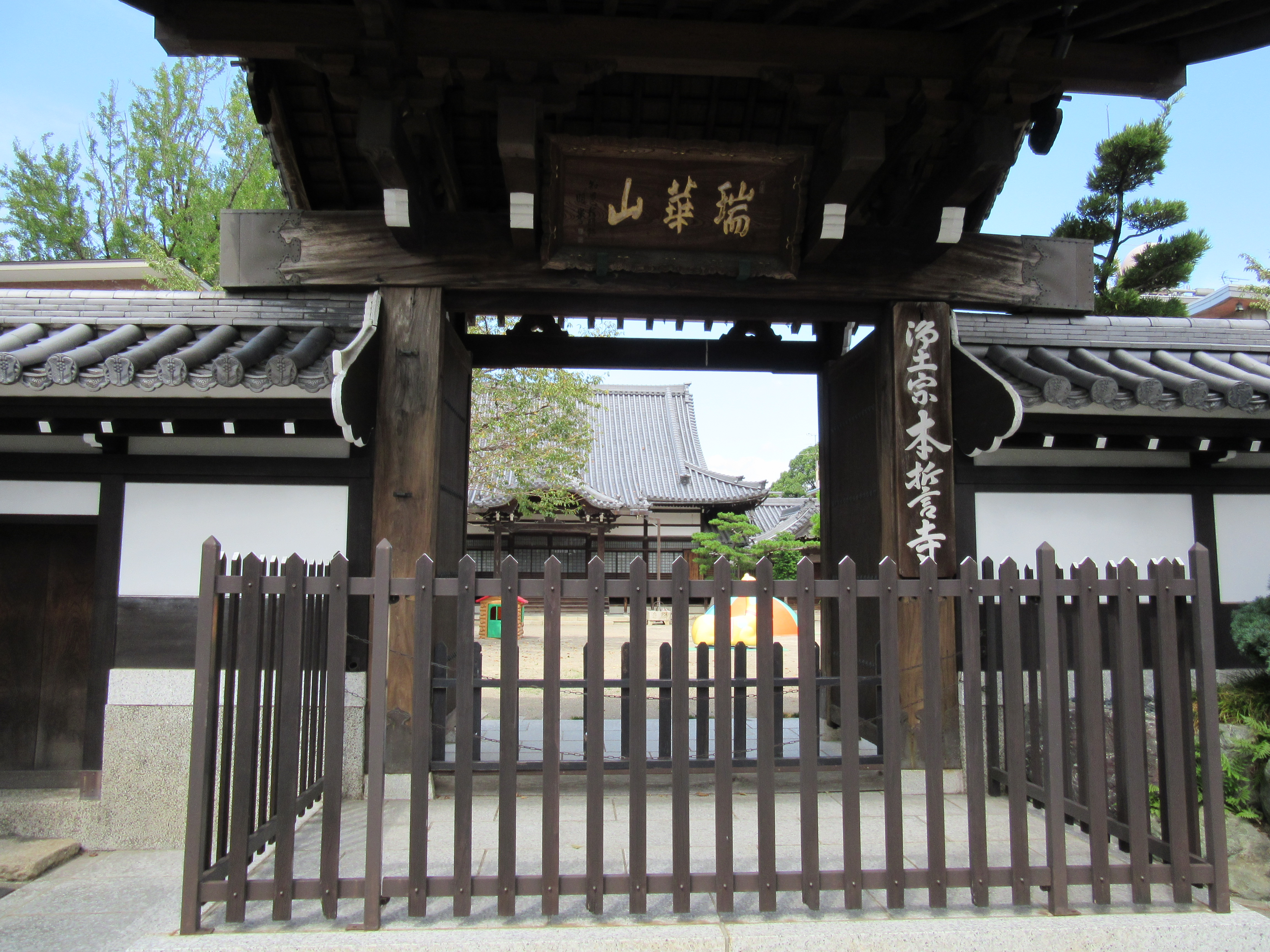 本誓寺(岐阜市)